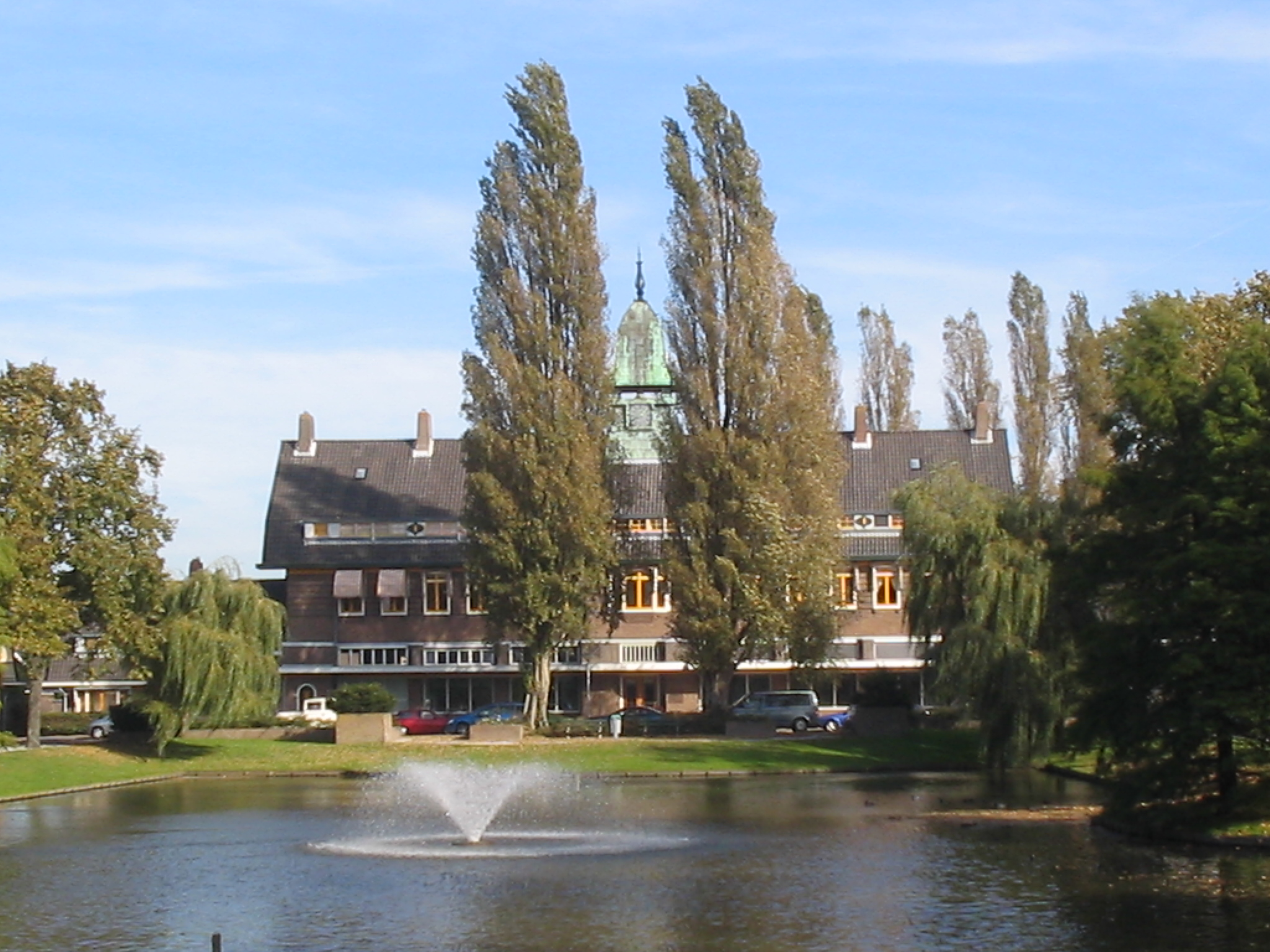 Agnetapark, Delft, 18 oktober 2005